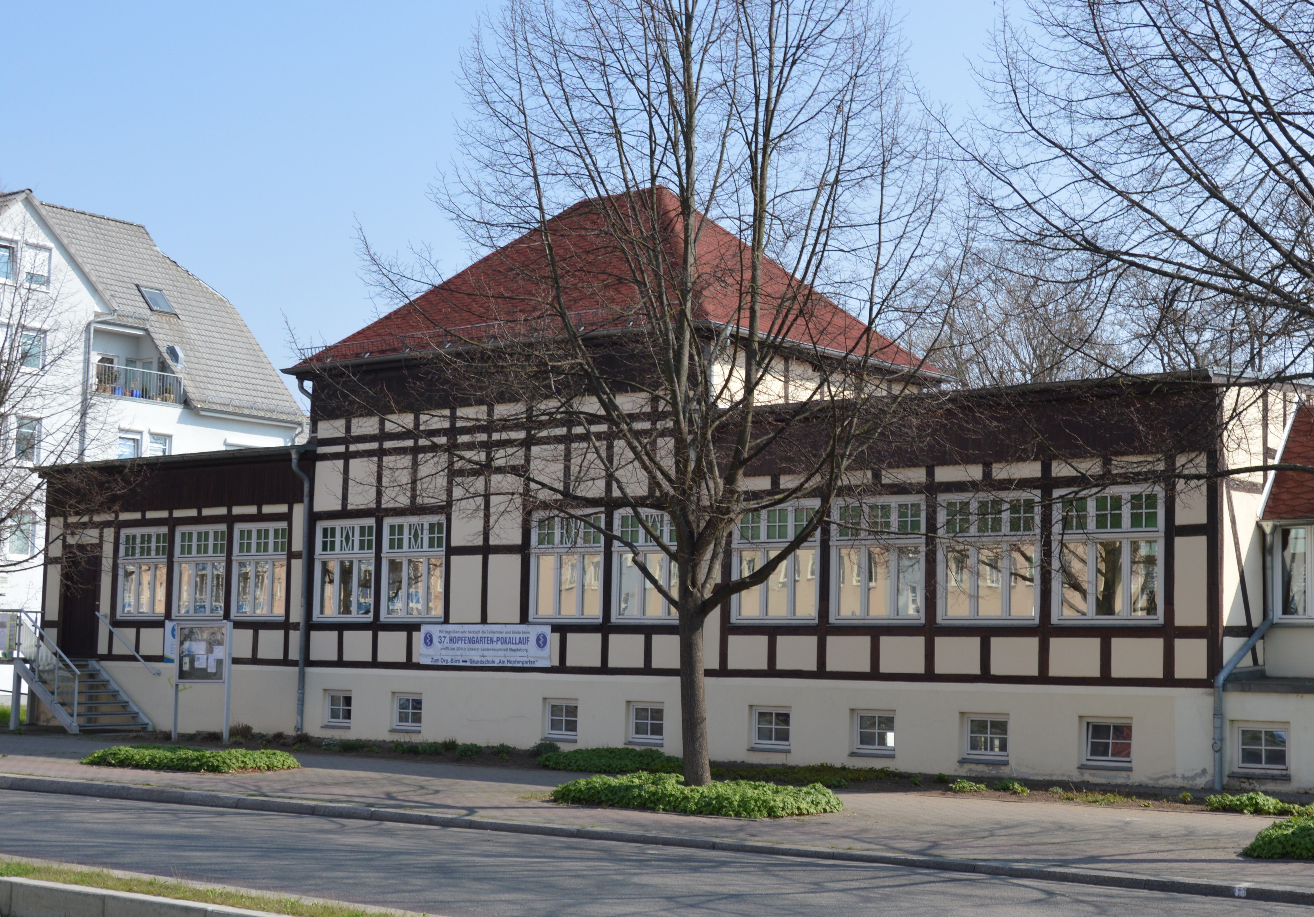 Haus Leipziger Chaussee 57 in Magdeburg